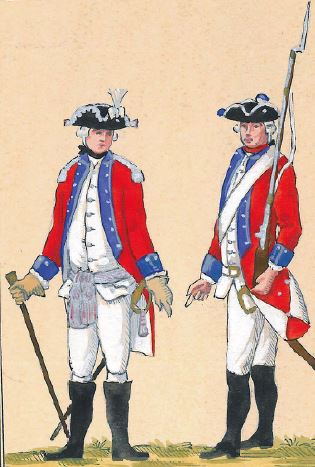 43. Regiment Pieszy (Potockiego)